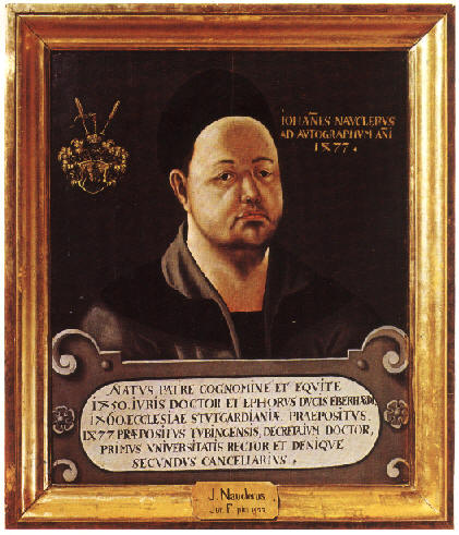 Johannes Vergenhans (Nauclerus) 1425. Erster Rektor und zweiter Kanzler der Universität Tübingen. Tübingen, Porträtsammlung der Universität.